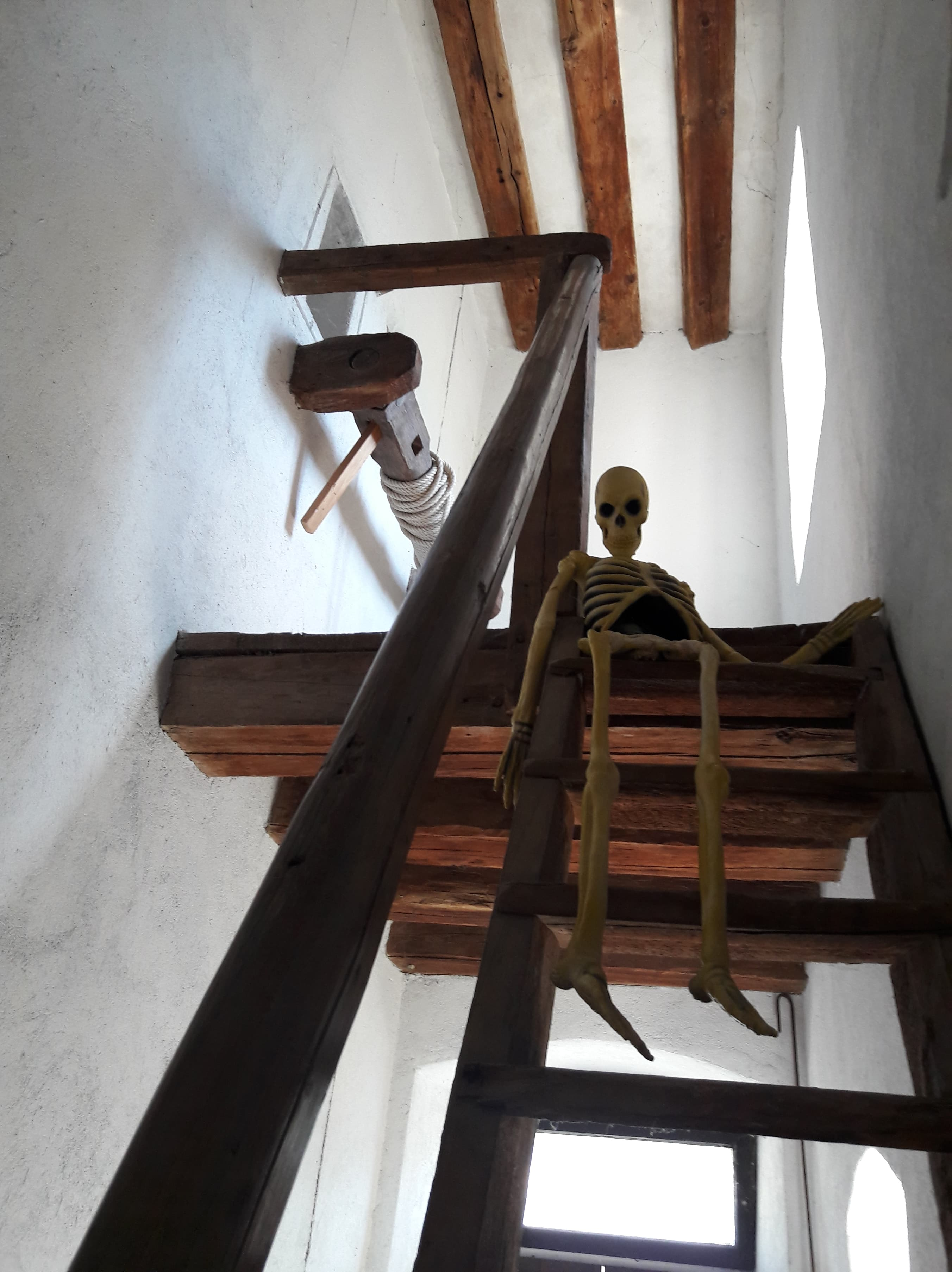 tour des sorcières à Sion